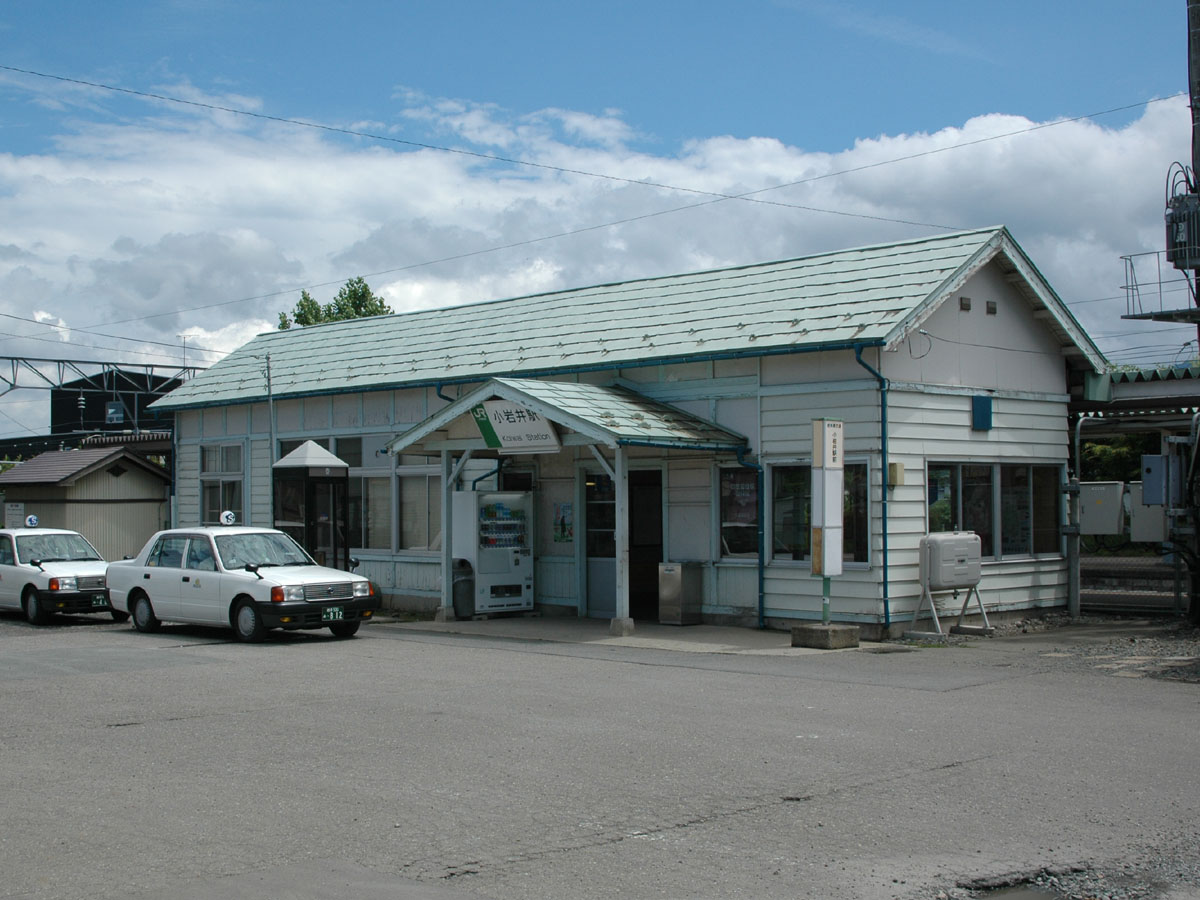 Koiwai Station, Takizawa, Iwate, Japan